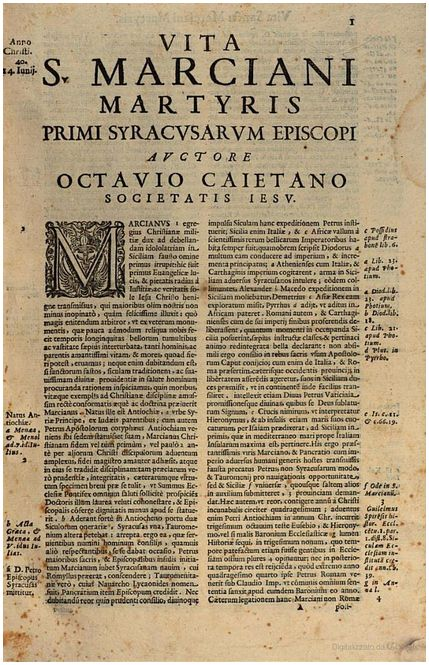 Opera di Ottavio Gaetani, Vitae Sanctorum Siculorum